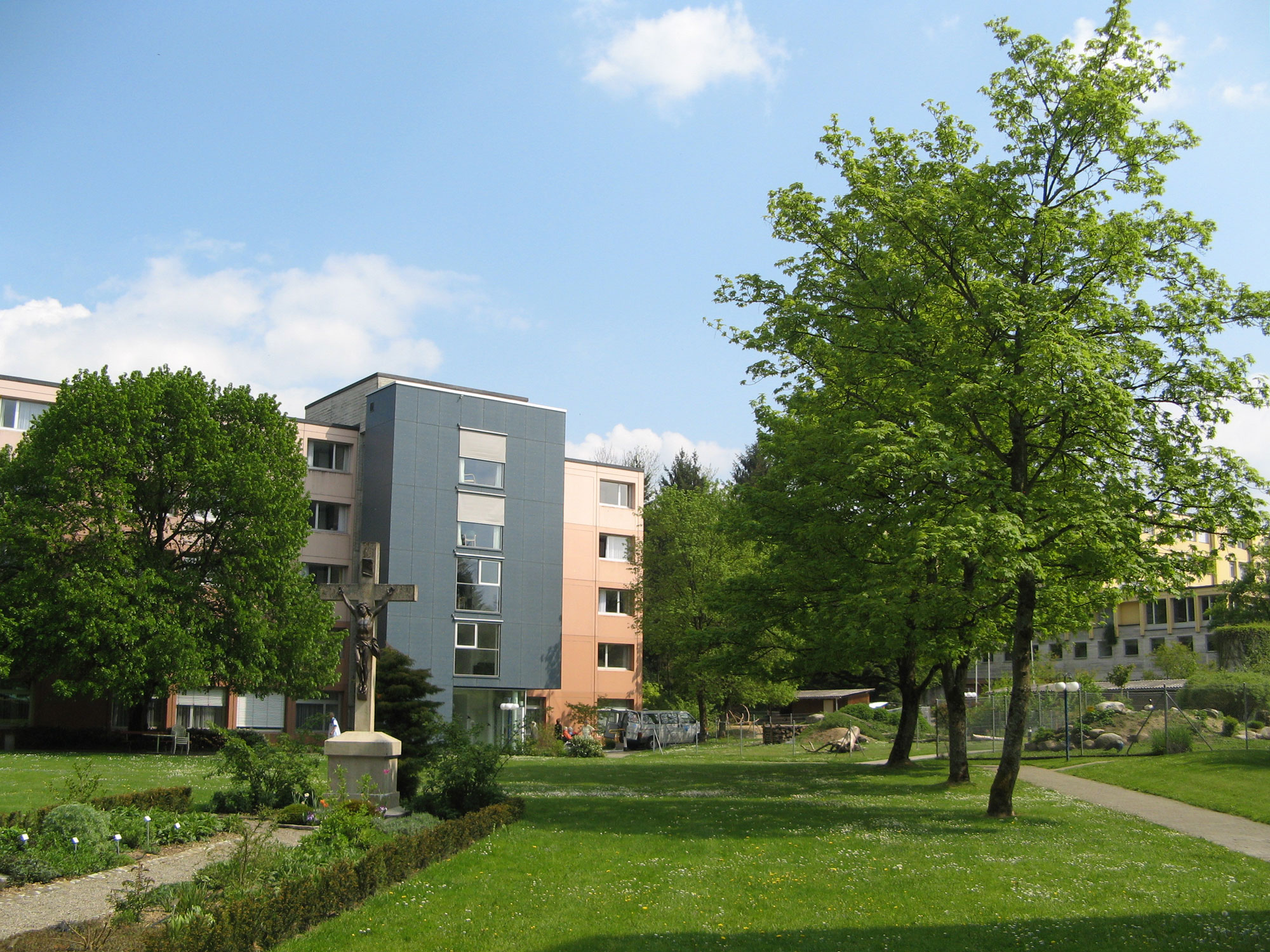 Kloster Gnadenthal: Personalhaus und Pflegefachschule